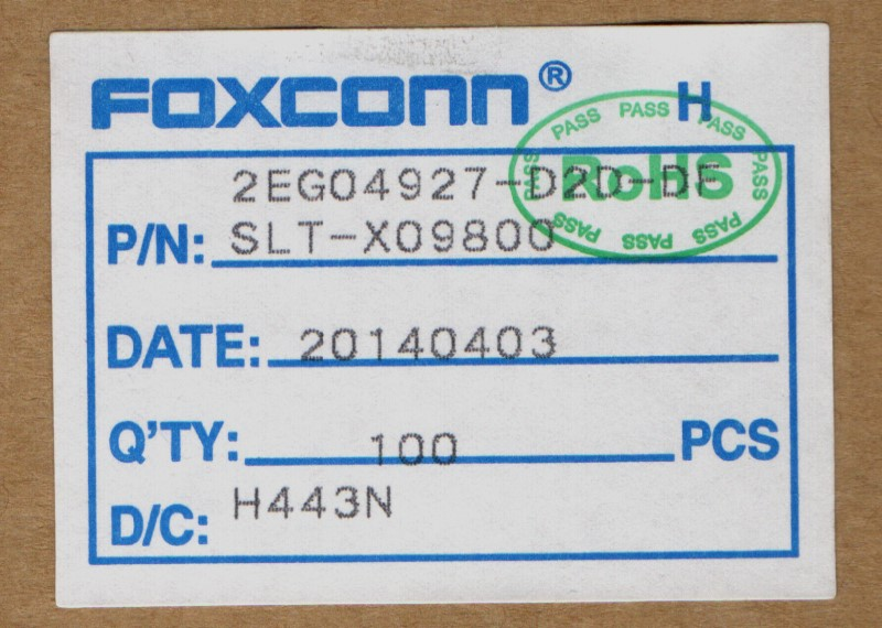 富士康連接器2EG04927-D2D-DF外盒標籤